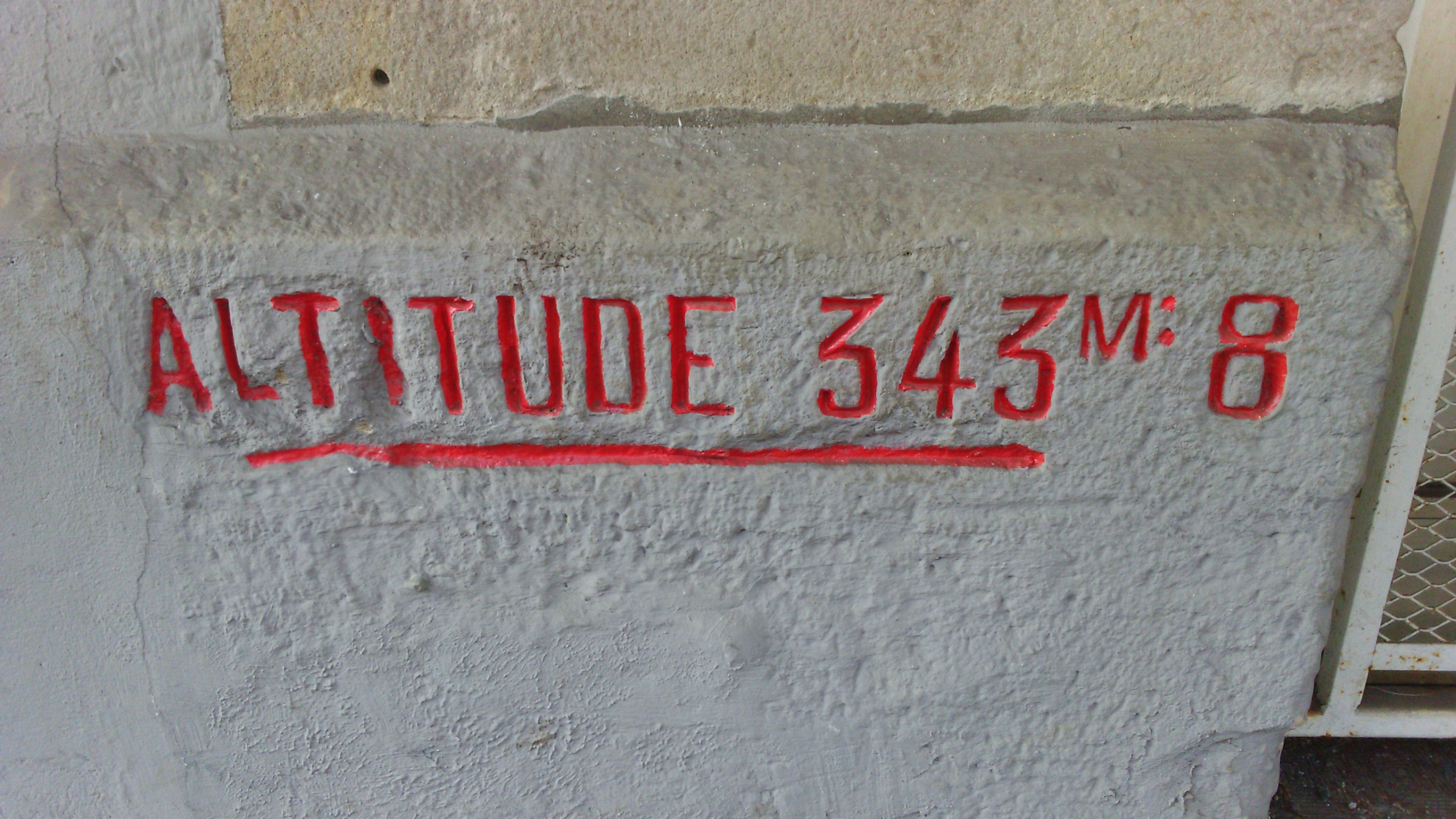 Repère d'altitude - Gare d'Héricourt, Haute Saone, France